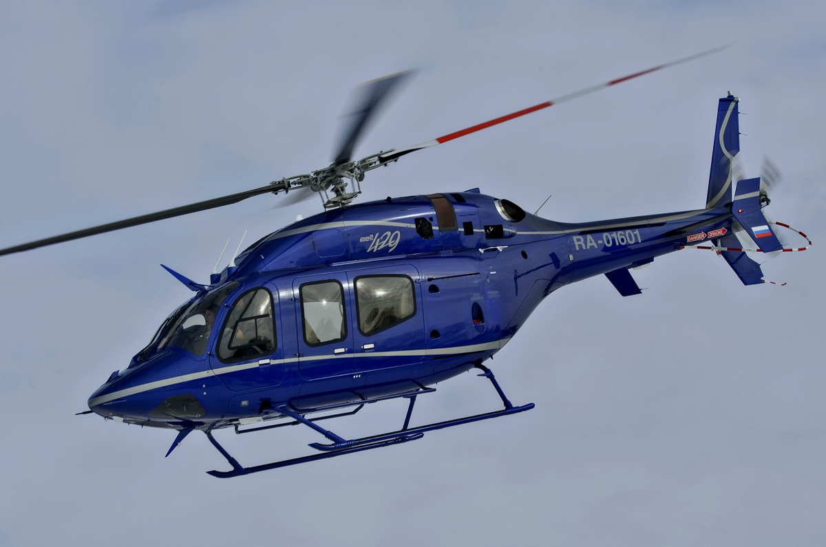 Bell429 RA-01601